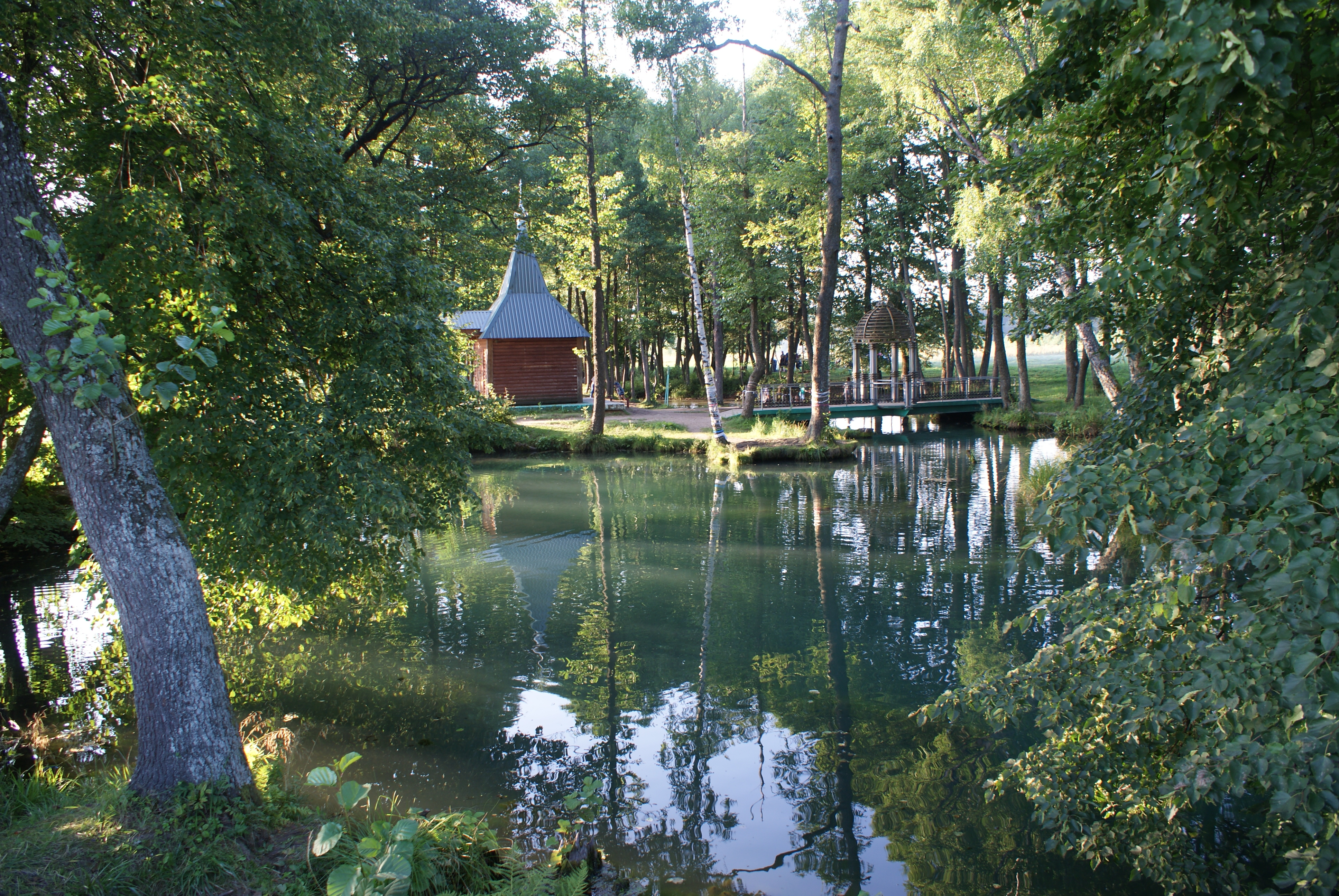 Блакітная крыніца